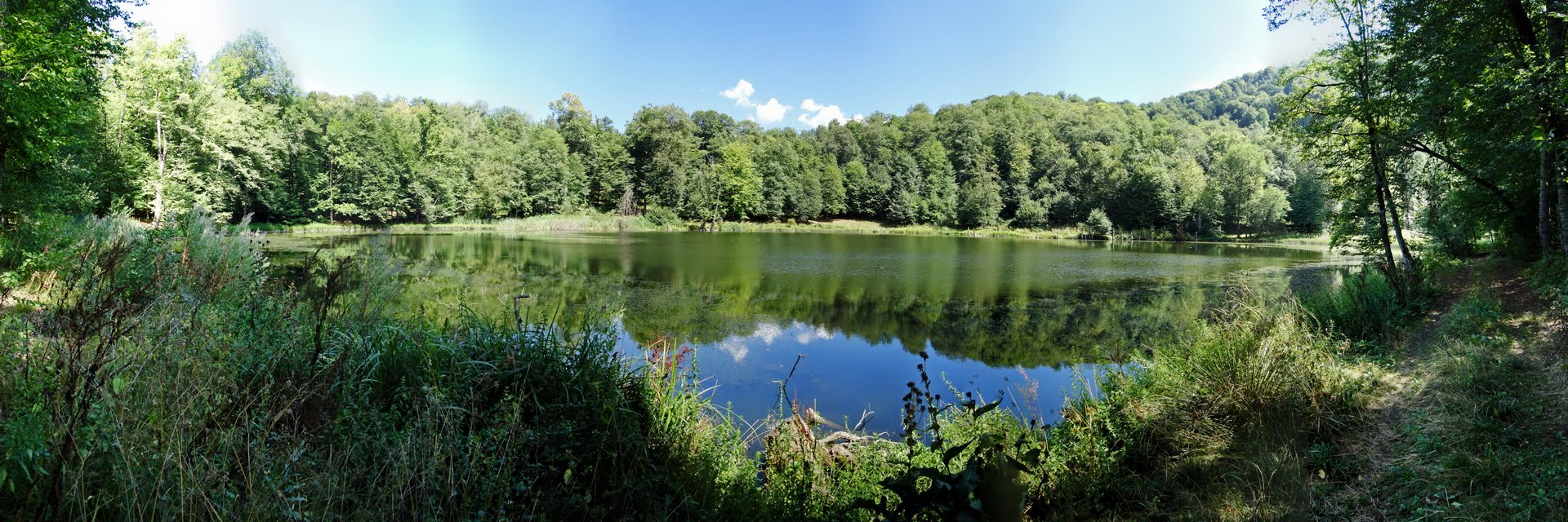 Озеро Гошалич